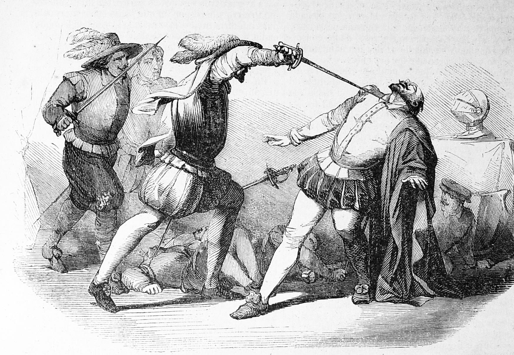 Puede acceder al libro completo en el siguiente enlace : Historia de la conquista del Perú : con observaciones preliminares sobre la civilización de los incas / por Guillermo H. Prescott. - Madrid : Gaspar y Roig, 1851